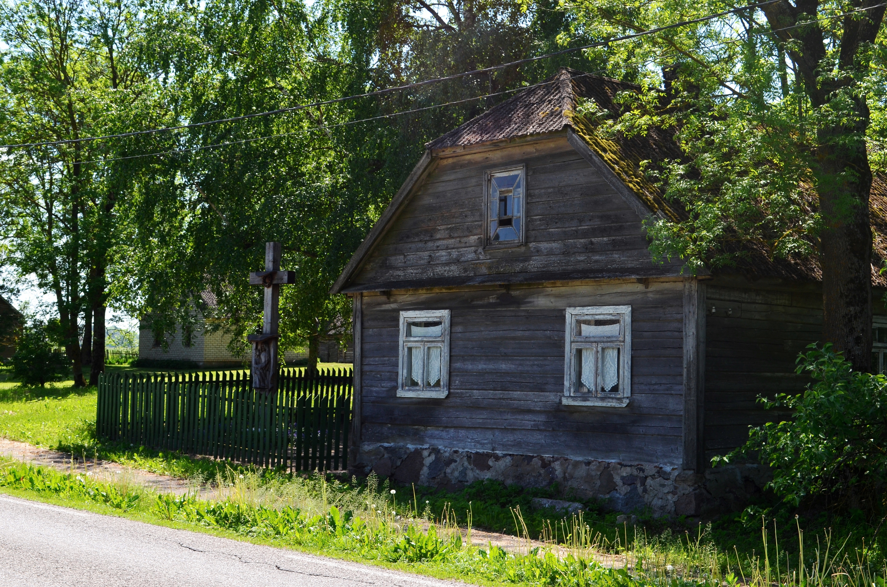 Mėdginai, Joniškio raj.